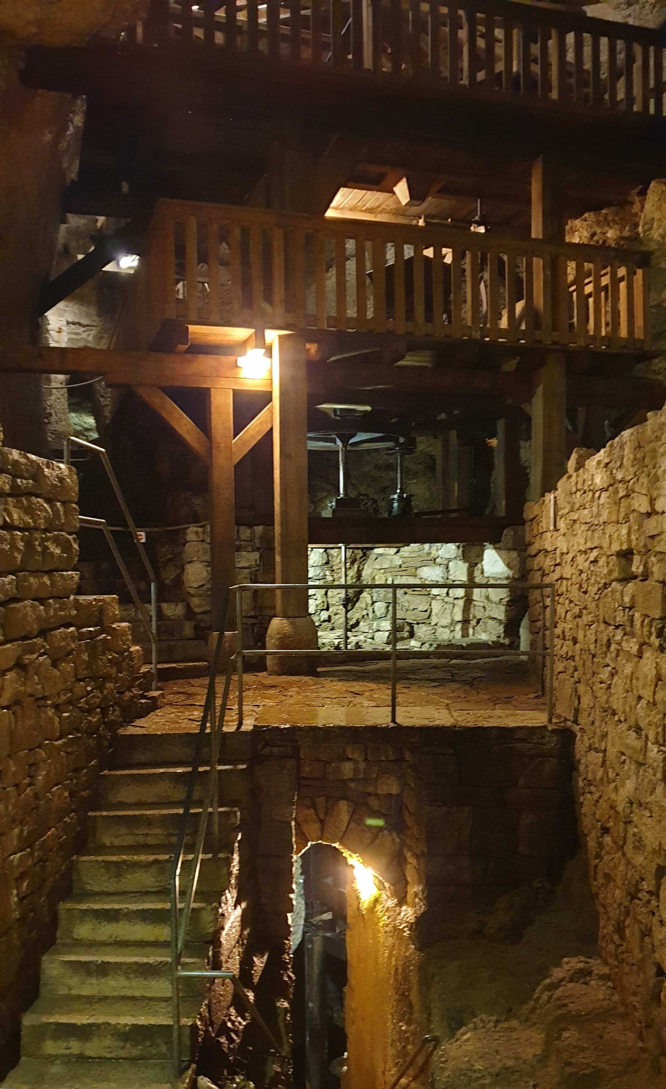 Höhlenmühlen von Le Locle: Getreidemühle über 4 Etagen (von unten nach oben: Wasserrad, Getriebe in vertikaler Welle, eigentliche Mühle, Einfülltrichter)